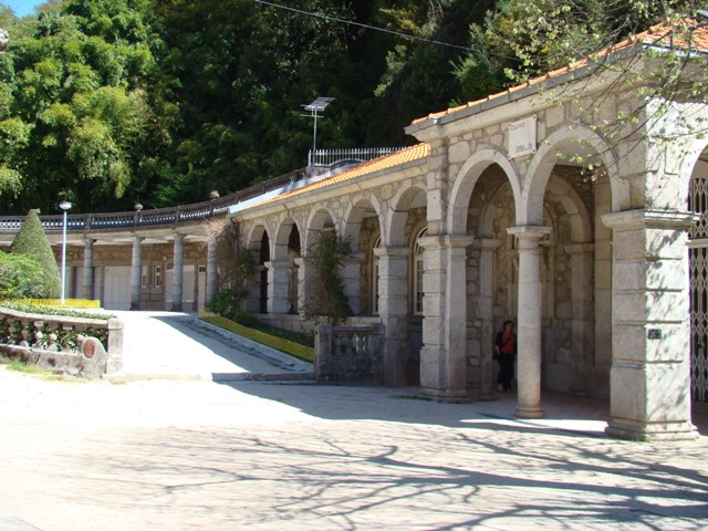 Edifício das águas termais, Vila do Gerês – Terras de Bouro